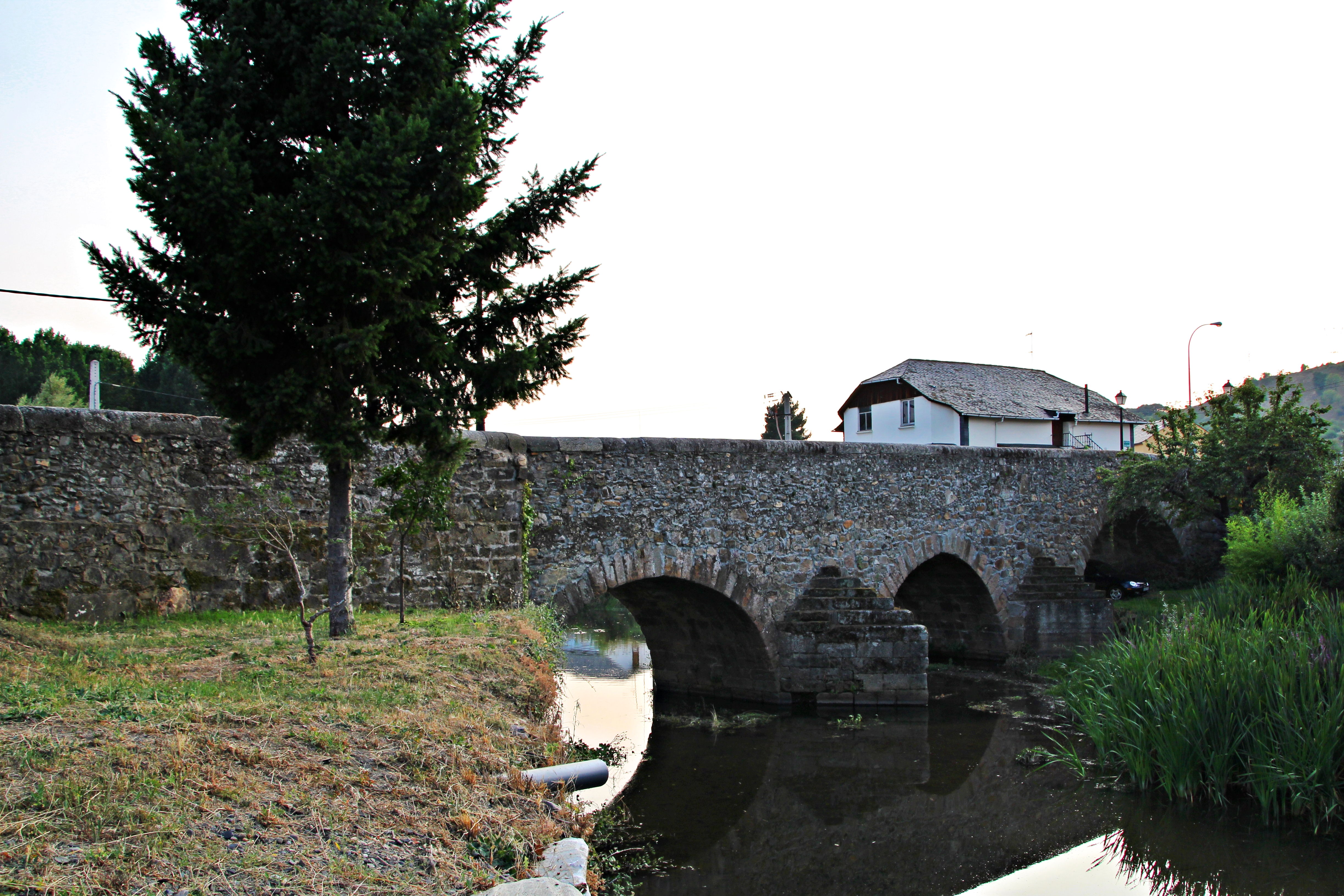 San Román de Bembibre, El Bierzo, provincia de León